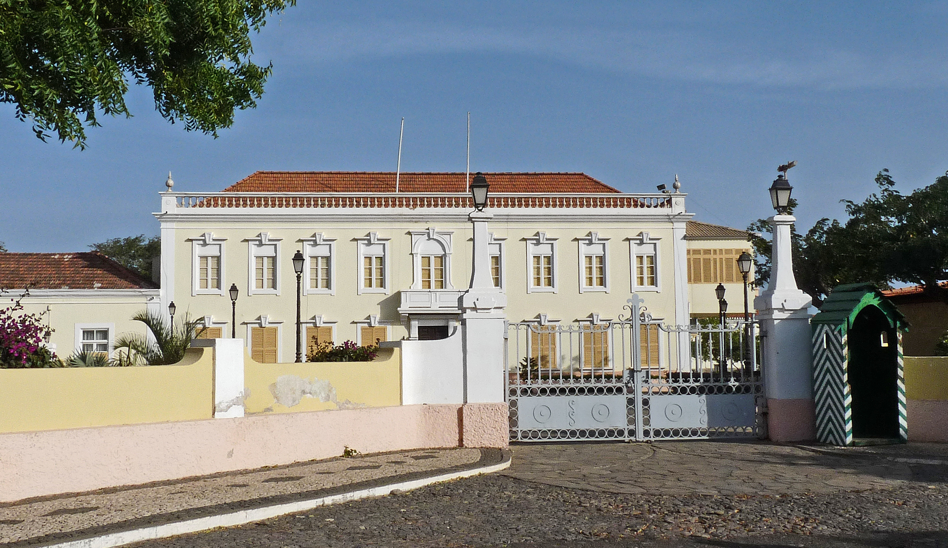 Praia (Cap-Vert) : Palais présidentiel